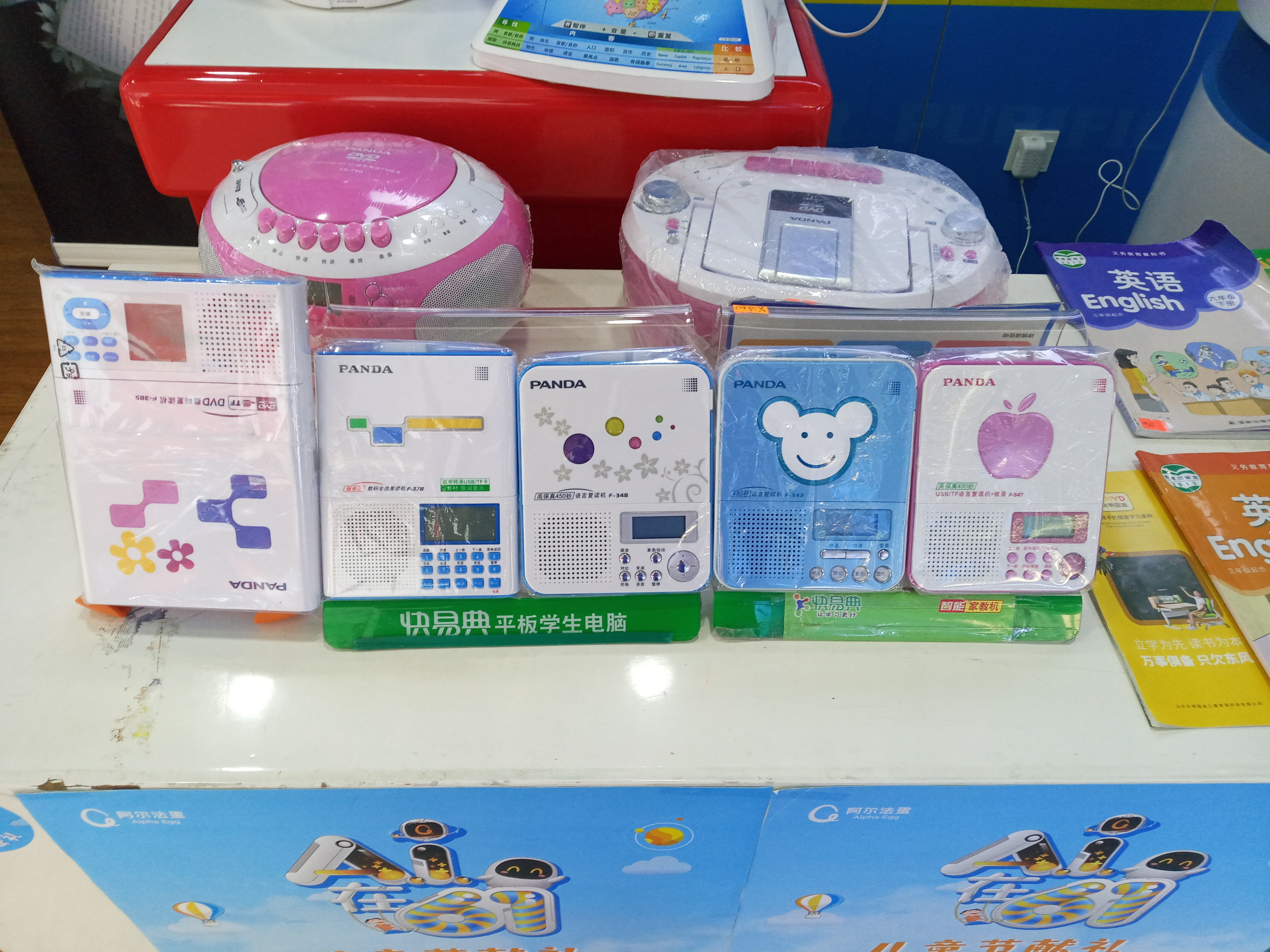 中文（中国大陆）: 中国某书店内经营复读机的柜台